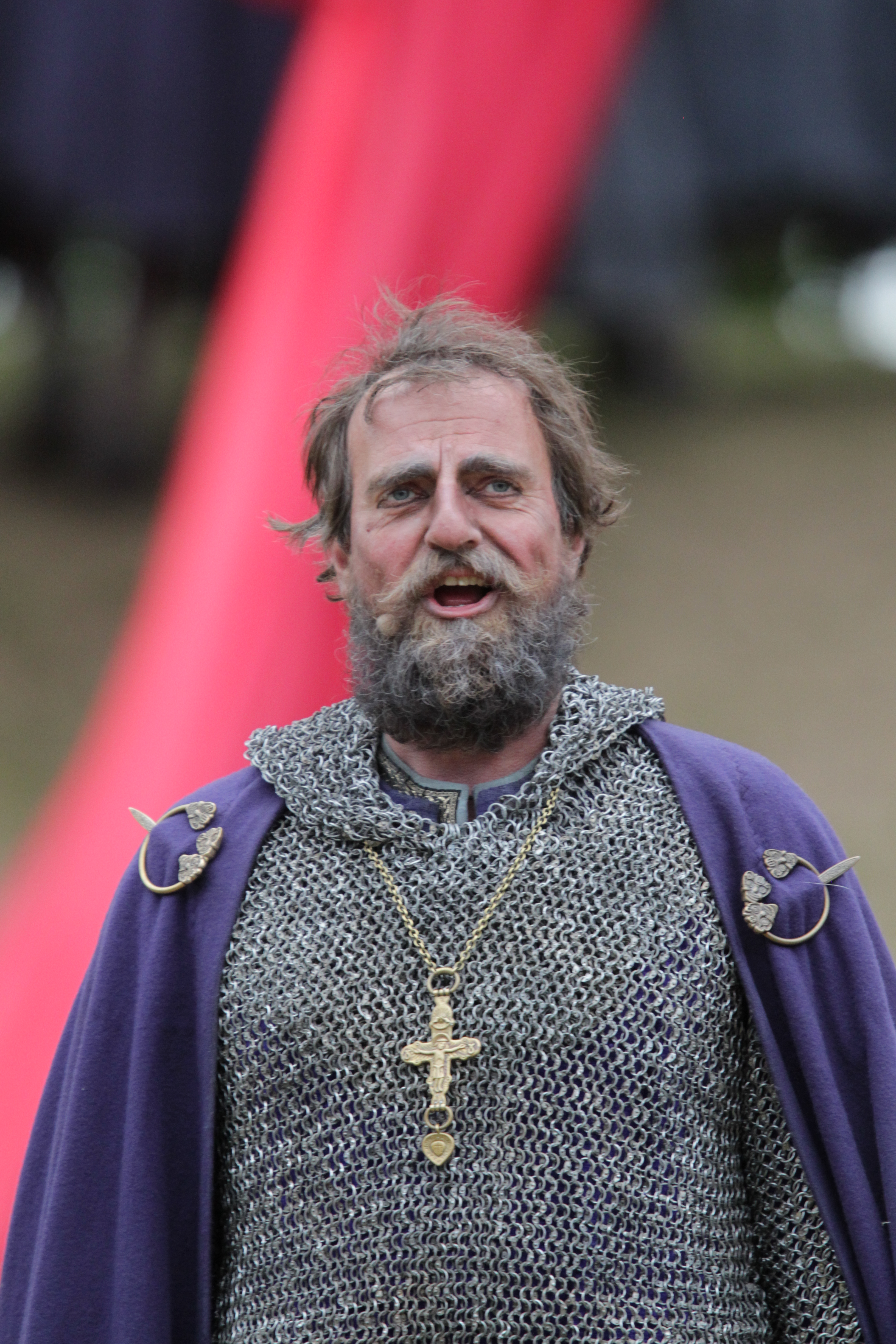 Norwegian actor Paul Ottar Haga as king Olaf II of Norway in the The Saint Olav Drama at Stiklestad 2010.